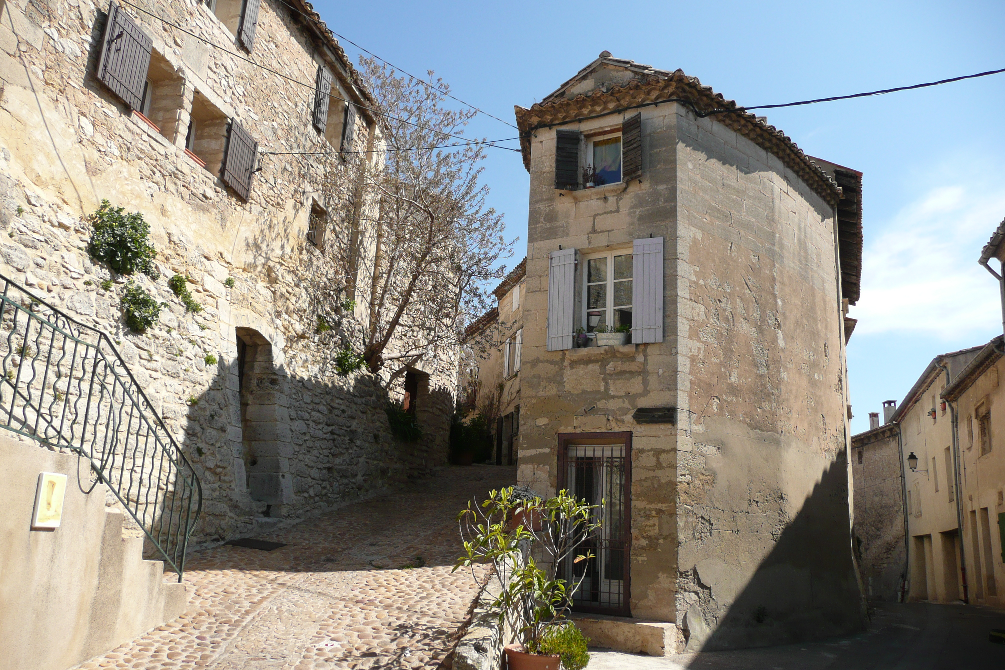 Vieux village, Les Angles.